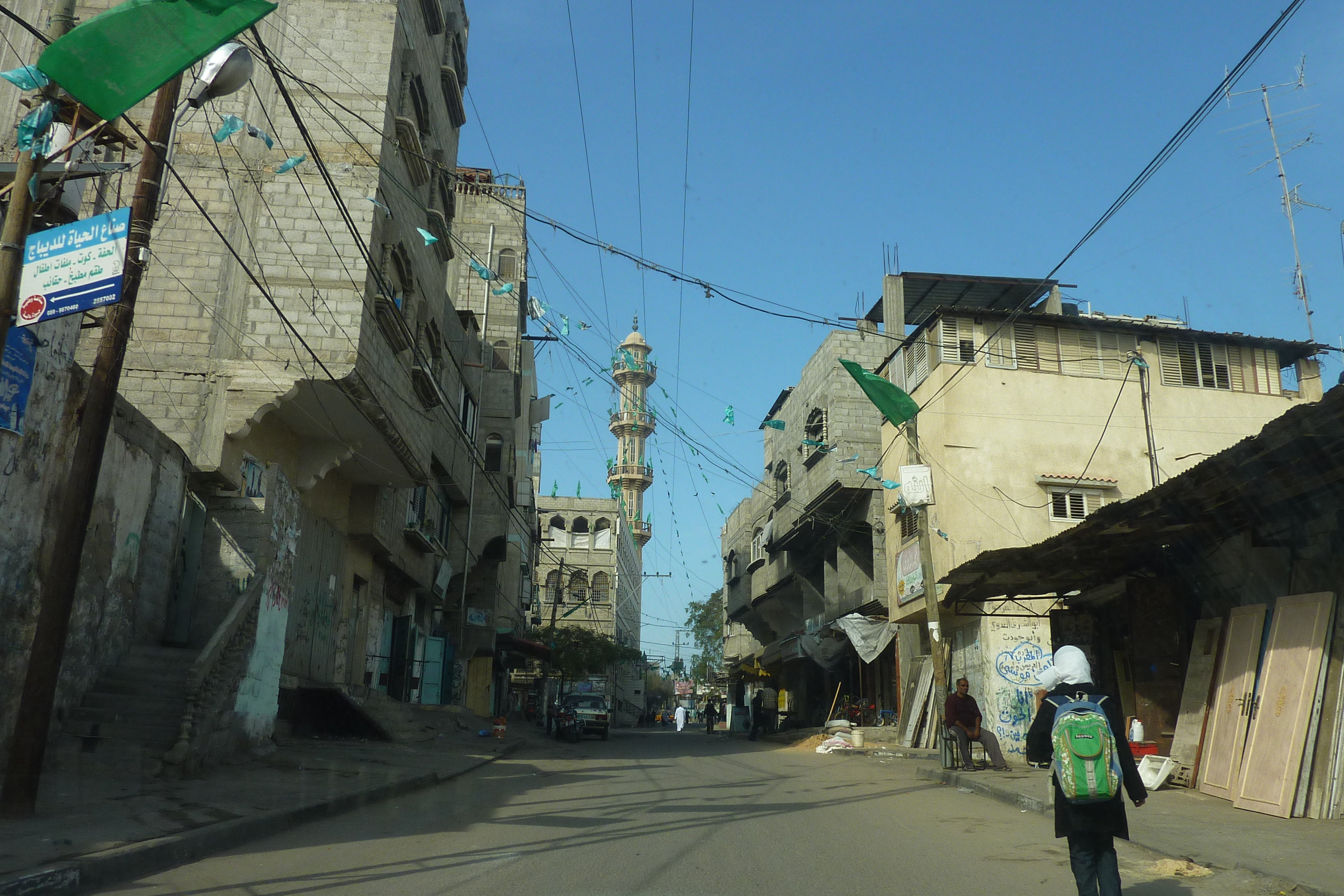 Nuseirat